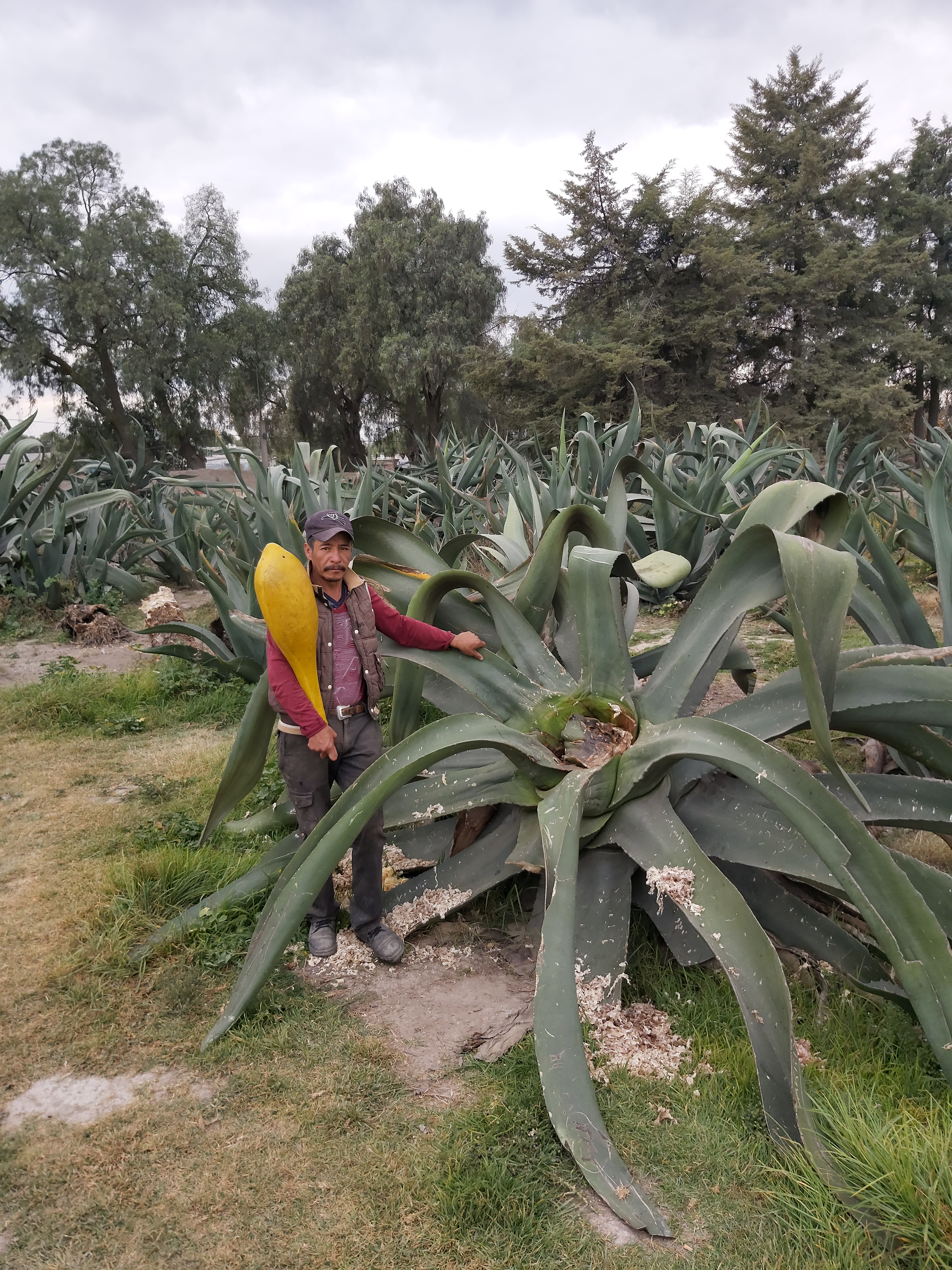 Tlachiquero en Tizayuca, Hidalgo después de raspar el maguey